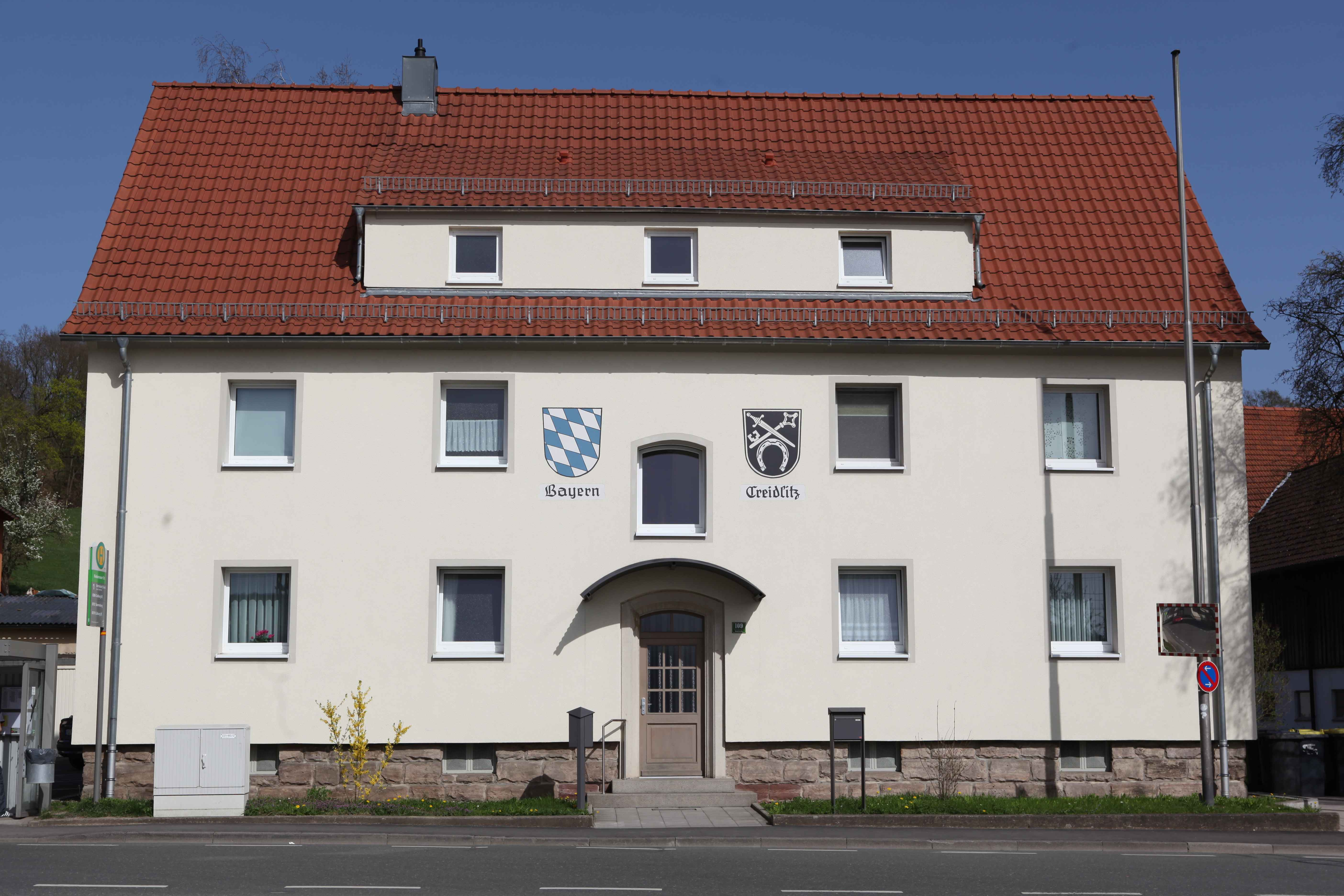 Ehem. Creidlitzer Gemeindehausm, Coburg-Creidlitz, Creidlitzerstr. 109